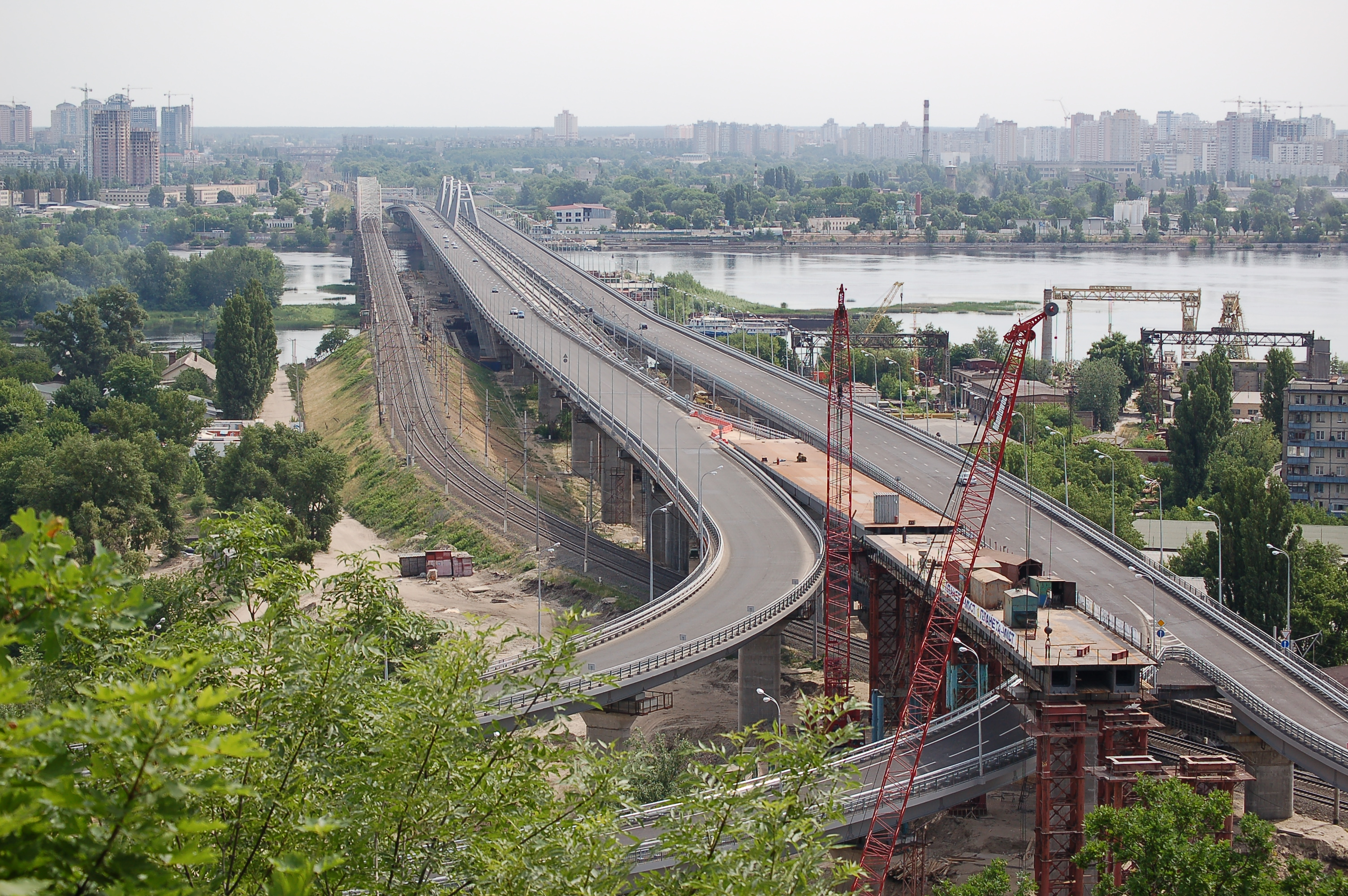 Дарницкий железнодорожно-автомобильный мост